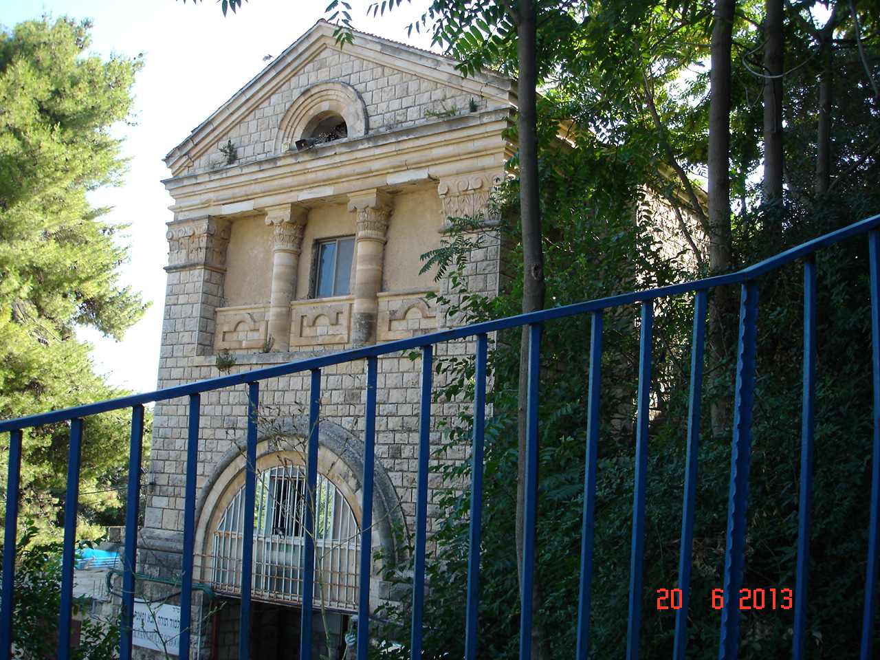 הכנסייה הסקוטית בצפת נבנתה בראשית המאה ה- 20